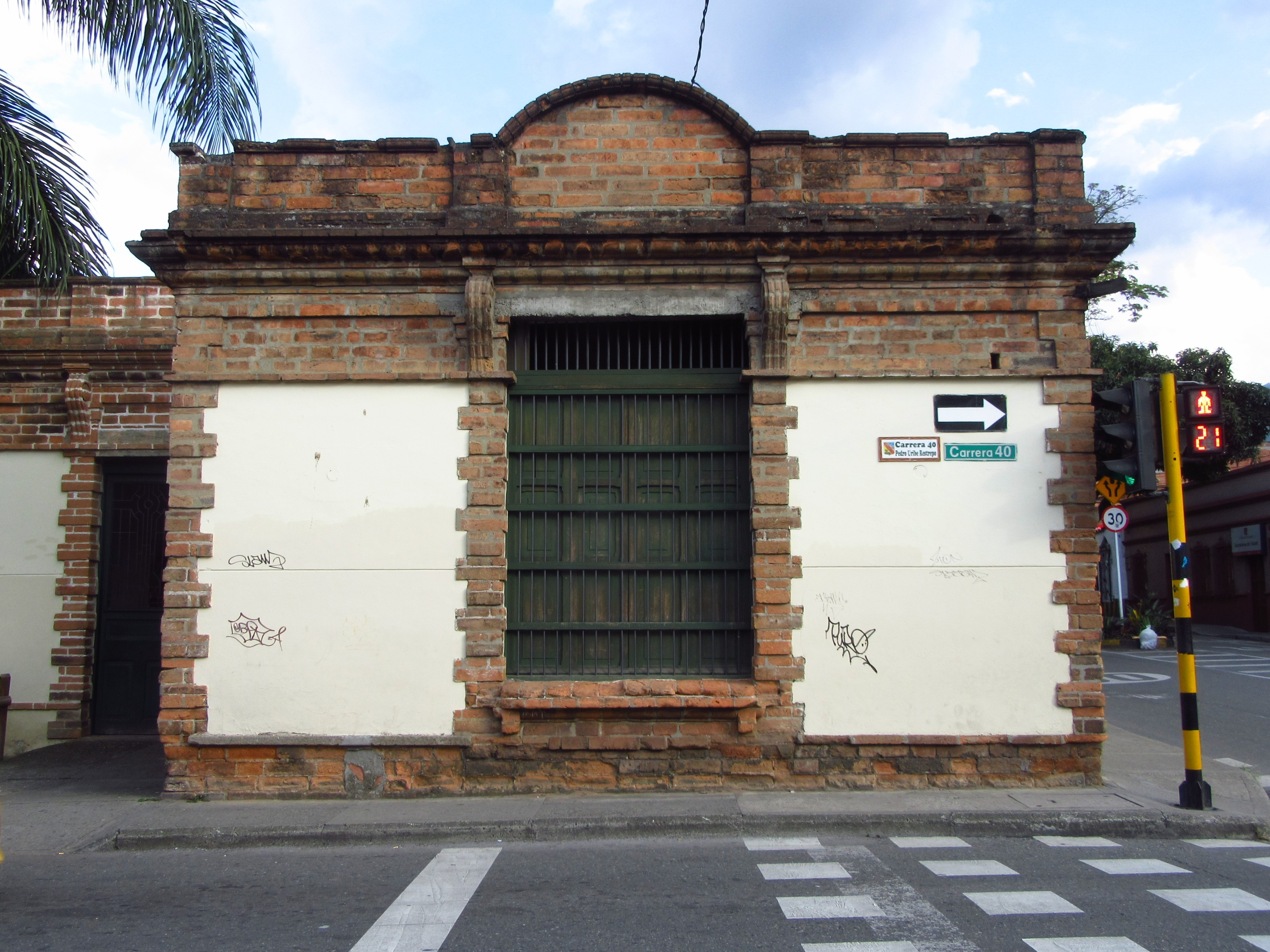 Fachada de la Escuela Fernando González, obra del arquitecto belga Aguistín Goovaerts, ubicada en Envigado y declarada monumento nacional el 2 de noviembre de 1995 mediante decreto 1913 de ese año.